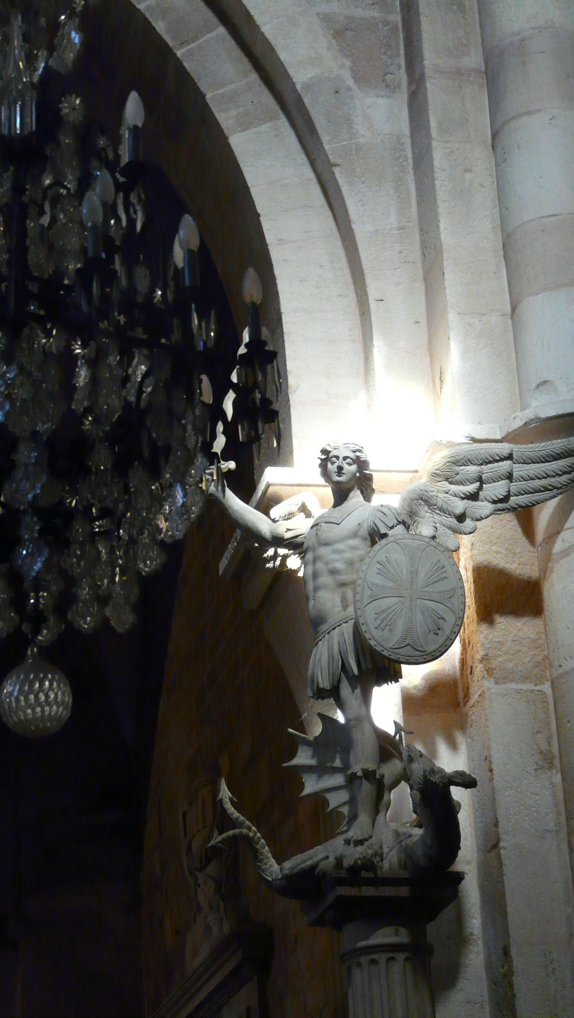 Représentation de l'arc ange Saint Michel, Église de Beaune, France